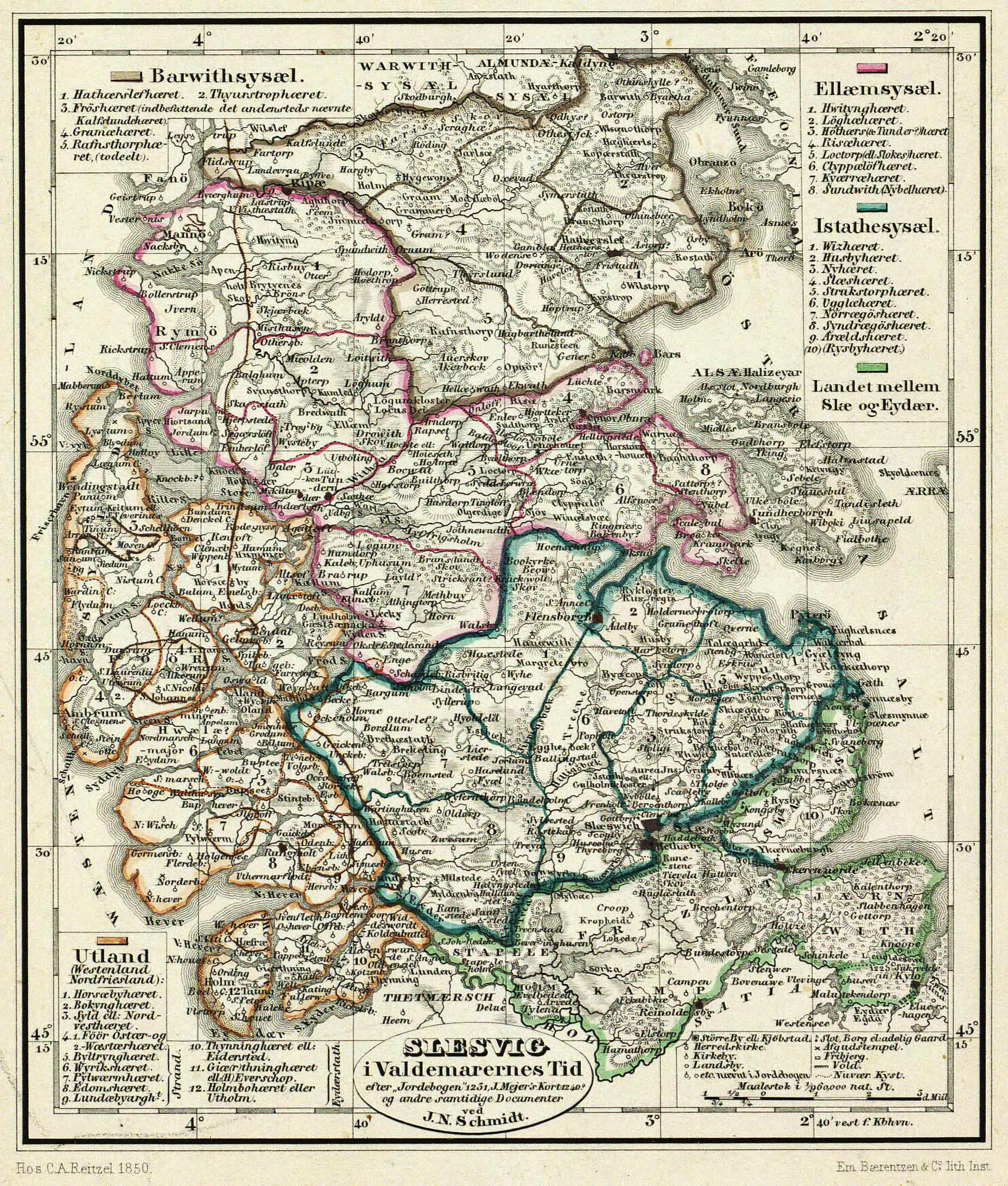 Slesvig i Valdemarernes Tid efter Valdemars Jordebog